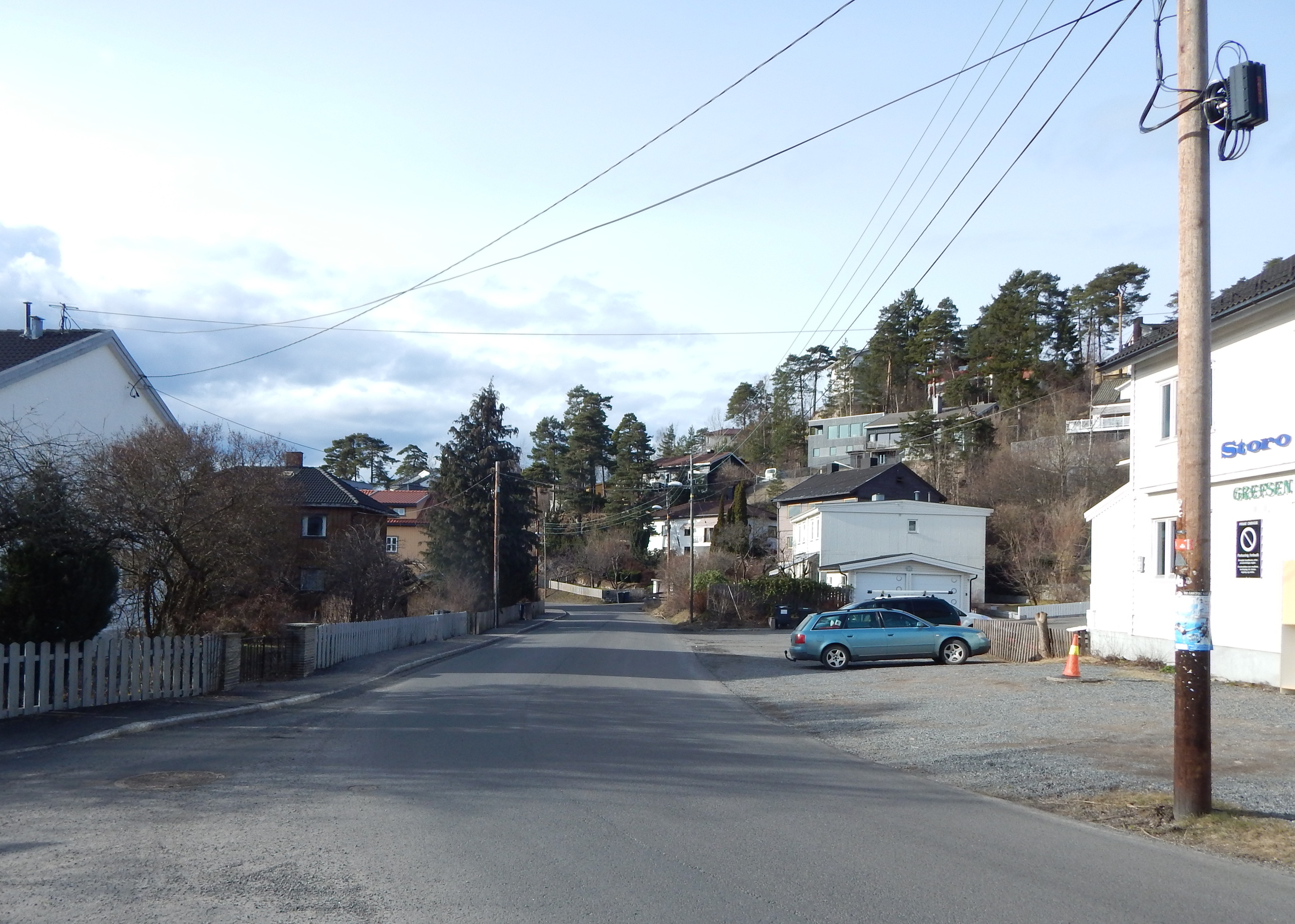 Frennings vei nær krysset med Christian Schous vei (t.v.)